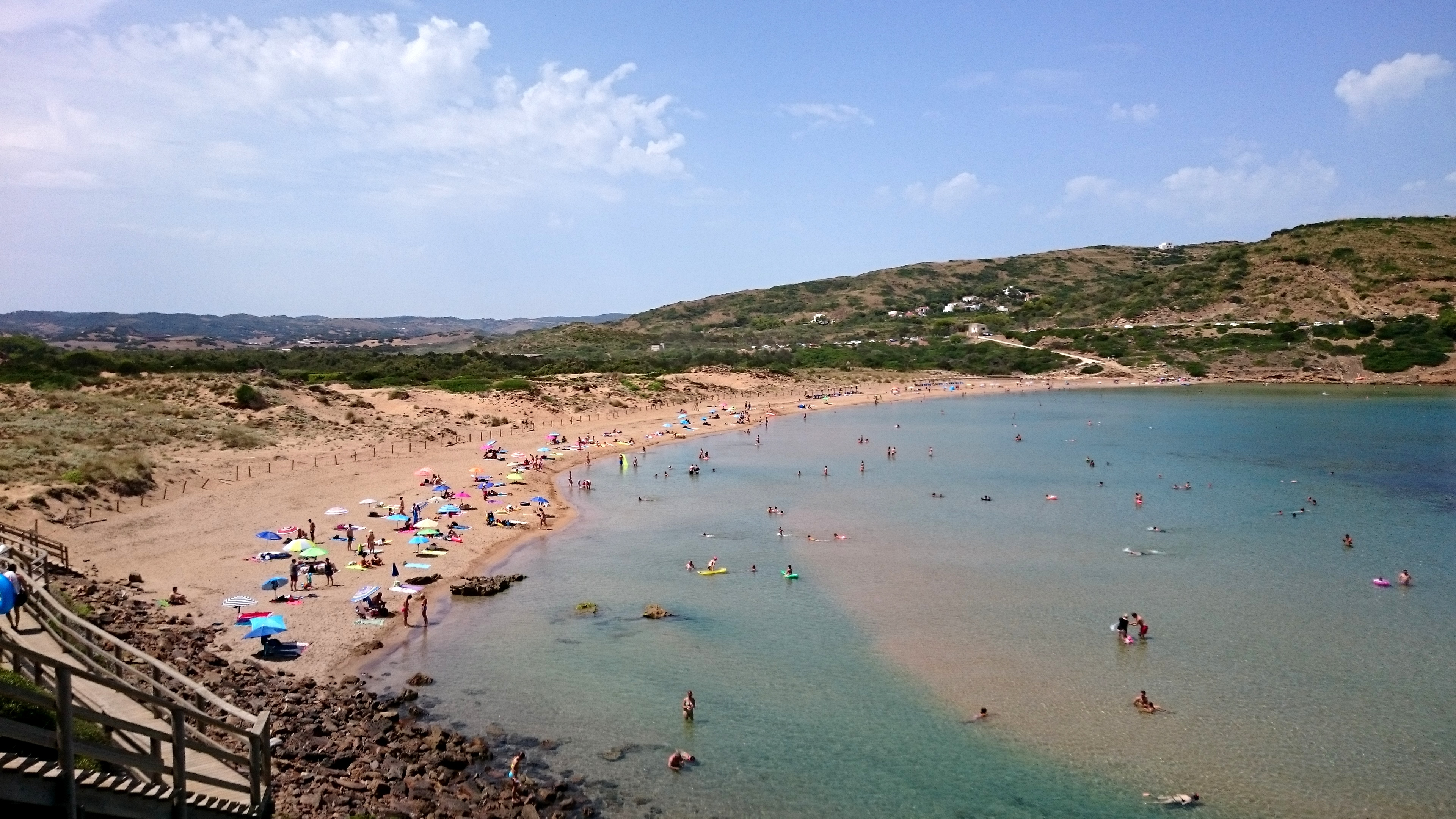 Cala Tirant This is a photography of a Special Area of Conservation in Spain with the ID: ES0000231. Natura2000 entry, EEA entry